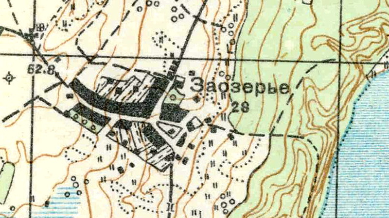 Топографическая карта Ленинградской области, квадрат О-35-10-В-г (Бол. Стремление), деревня Заозерье.